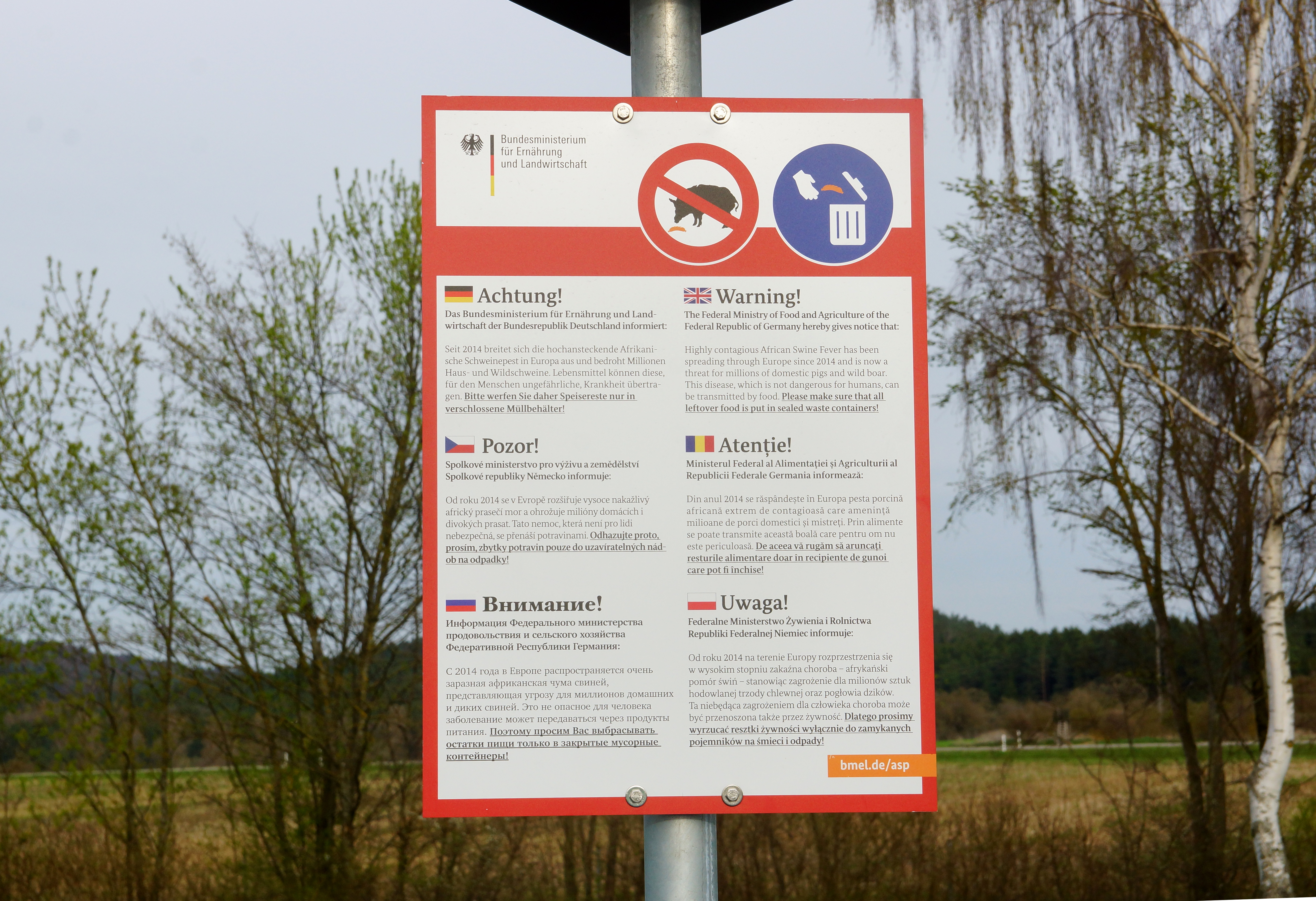 Warnschild an einem Autobahnparkplatz in Baden-Würtemberg zur Vermeidung eines Ausbruchs der afrikanischen Schweinepest keine Essensreste in unverschlossene Mülleimer zu werfen